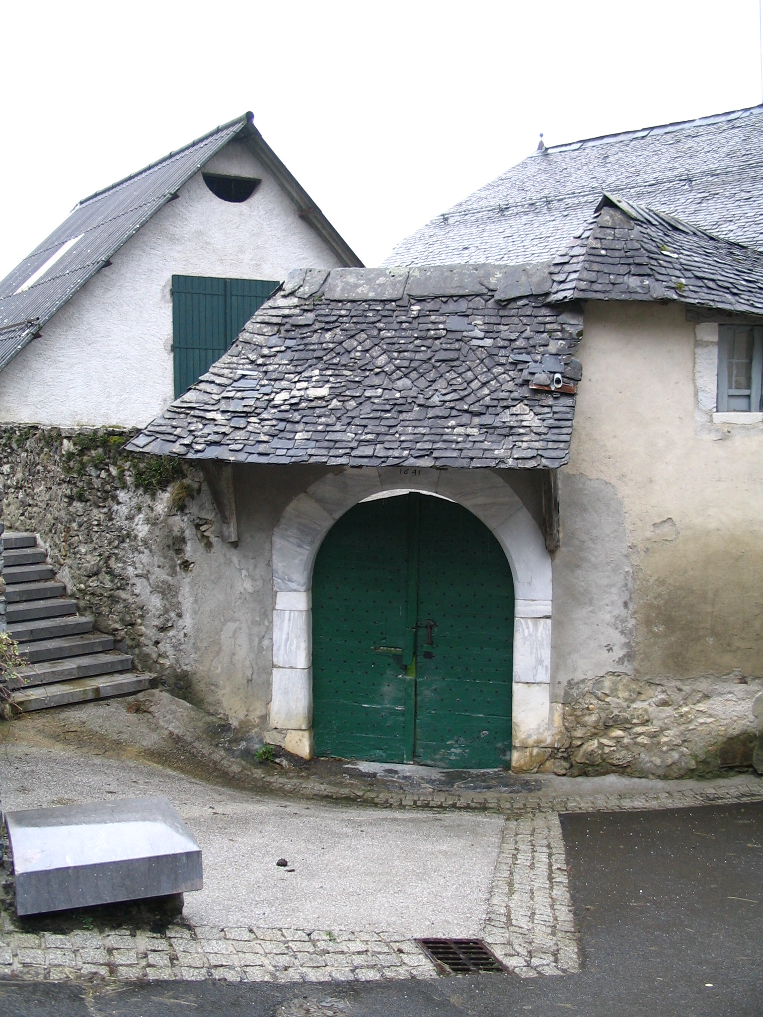 Bâtiments d'exploitation regroupés autour de la cour centrale Hameau de Bagès - Pyrénées Atlantiques - France Auteur: P.Charpiat - 2007